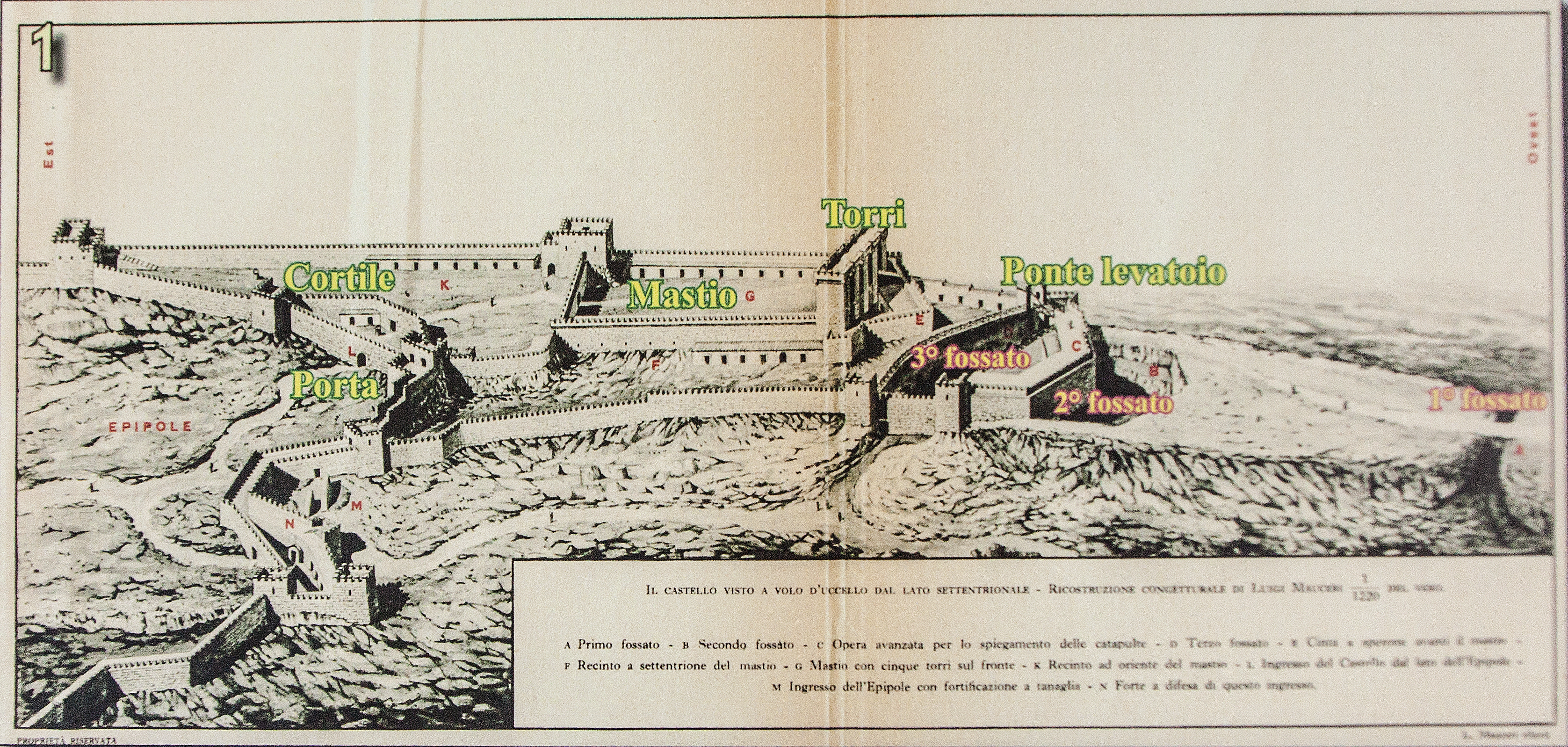 Ricostruzione del Castello Eurialo di Luigi Mauceri. Elaborazione di Elisa Bonacini da L. Mauceri, Il Castello Eurialo nella storia e nell'arte, 1928